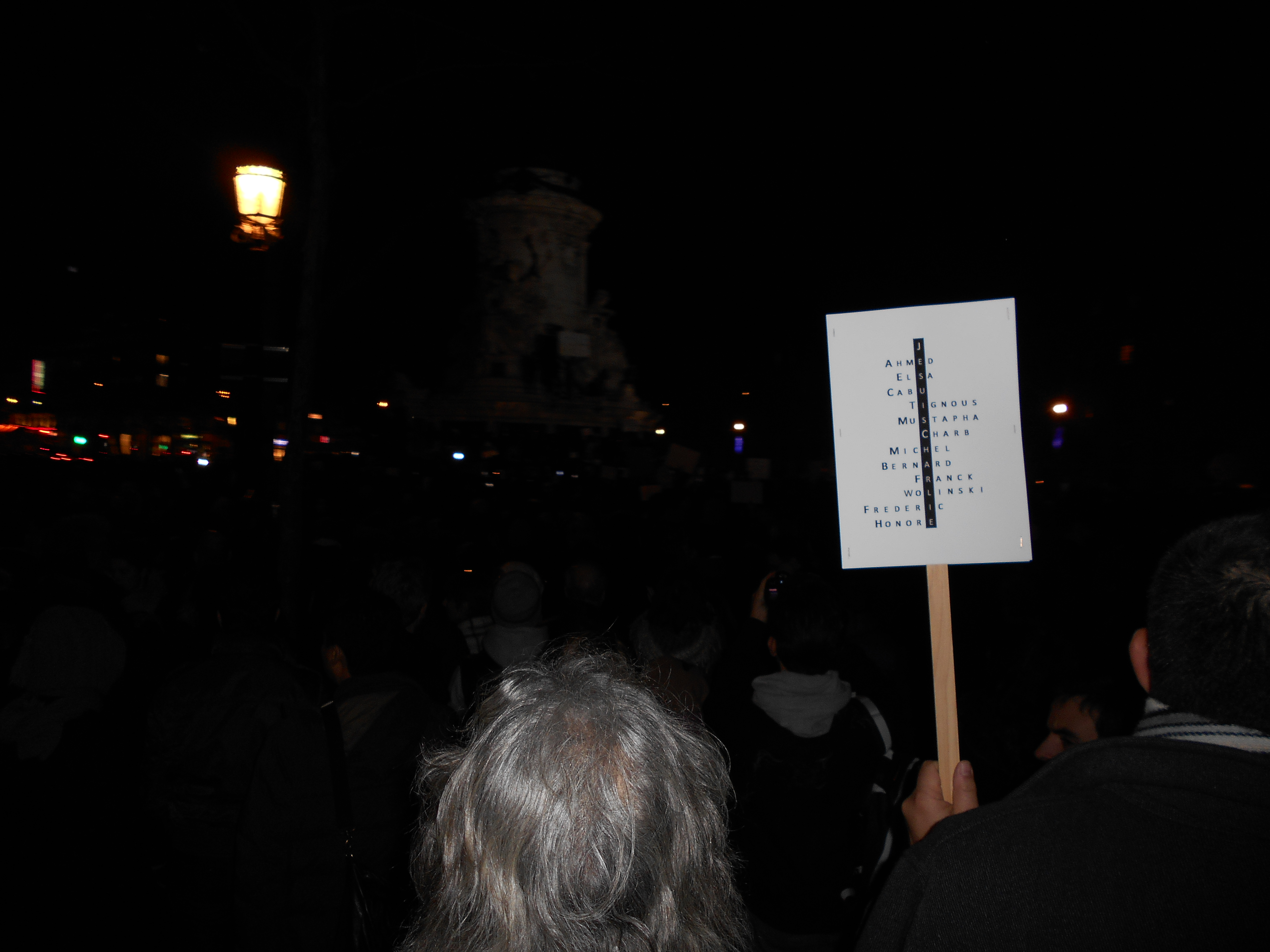 Acrostiche “Je suis Charlie” avec les noms ou prénoms des 12 victimes assassinées. (Place de la République à Paris le 8 janvier 2015).